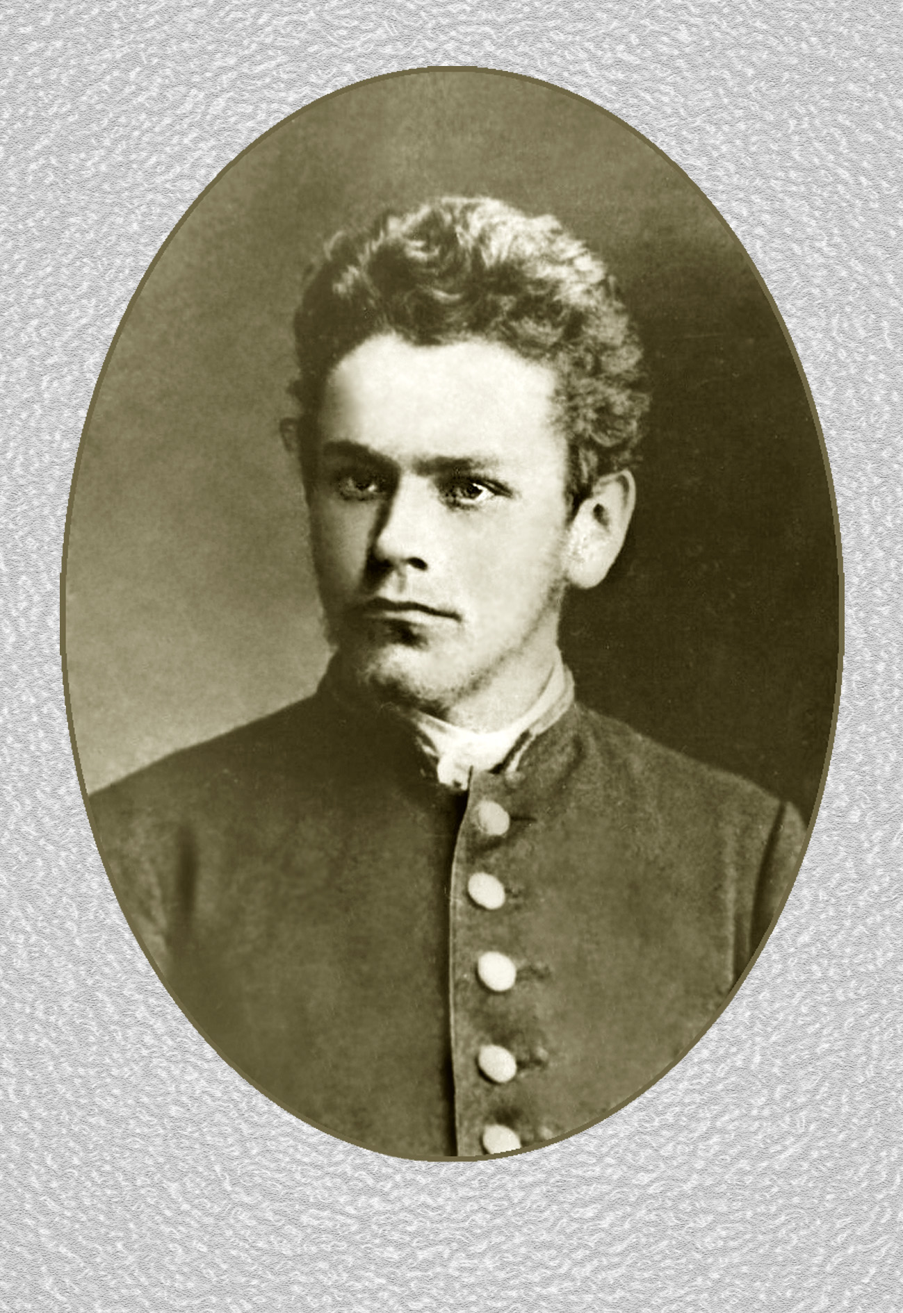 Член партии социалистов-революционеров (эсеров) Сергей Андреевич Никонов в годы учёбы